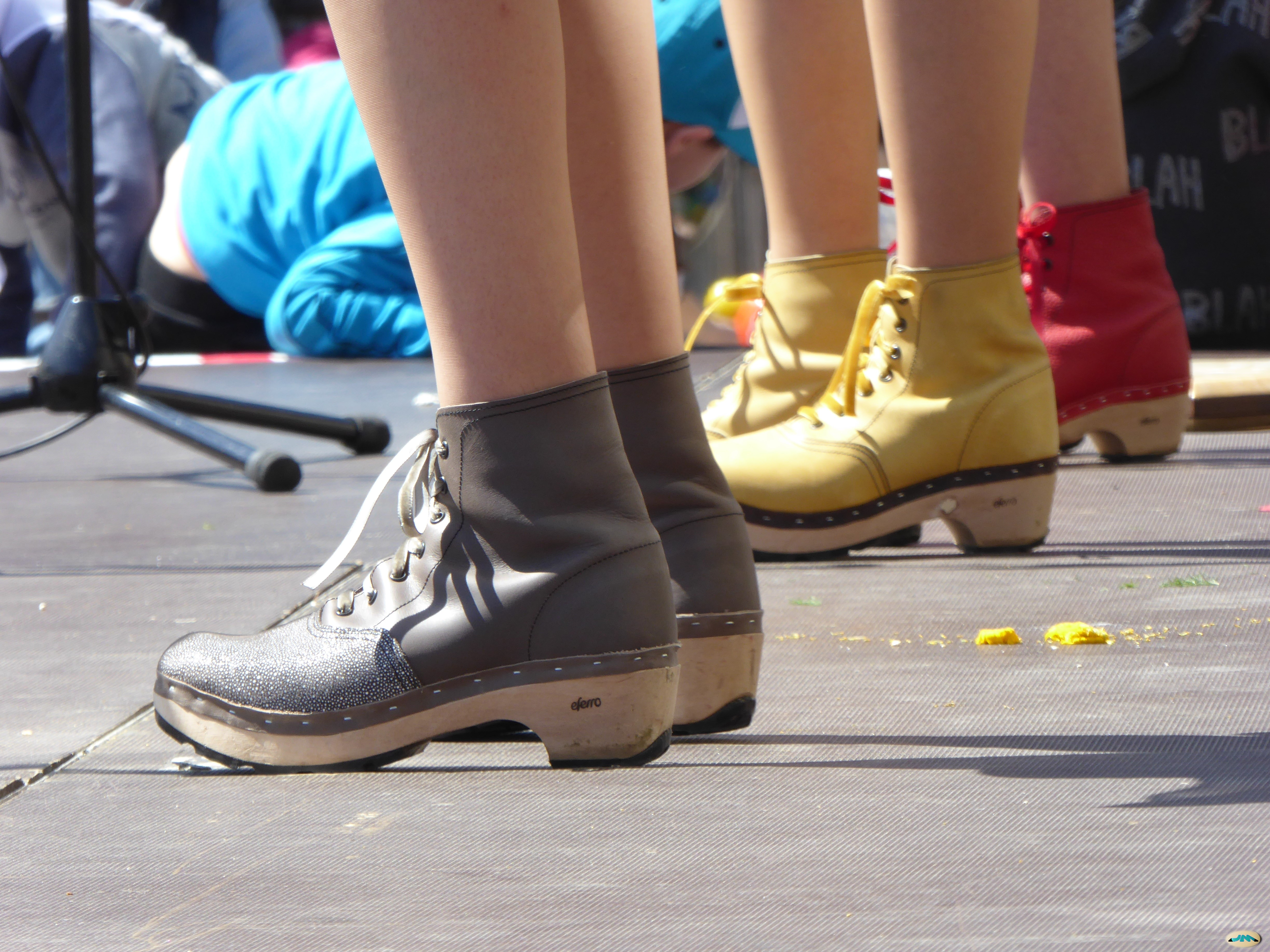 Los zuecos de las cantareiras